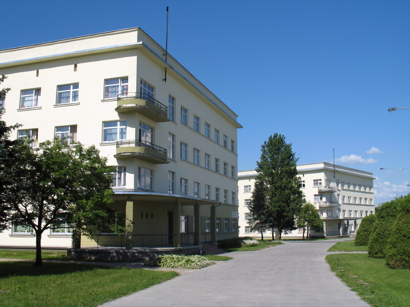 LŽŪU studentų bendrabučiai Noreikiškėse.